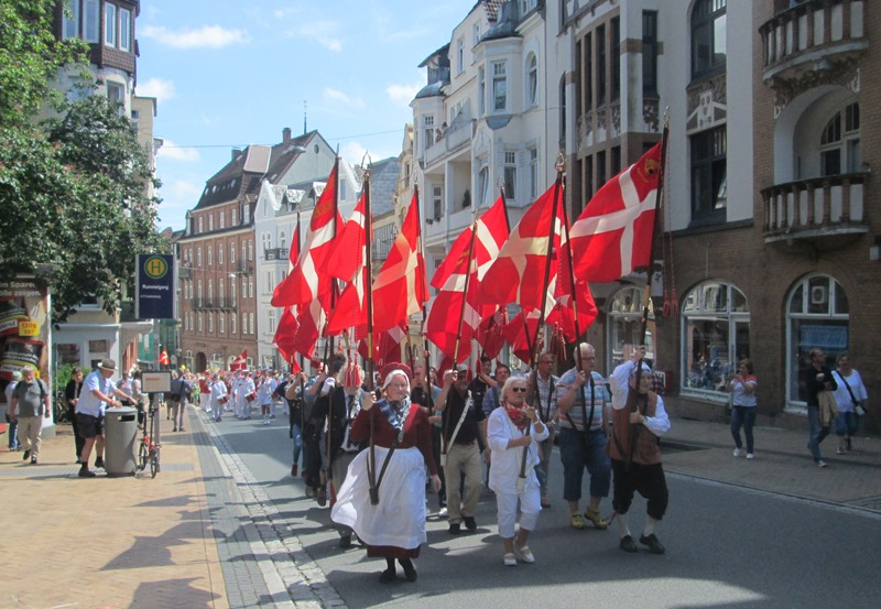 Dansk årsmøde i Flensborg 2017